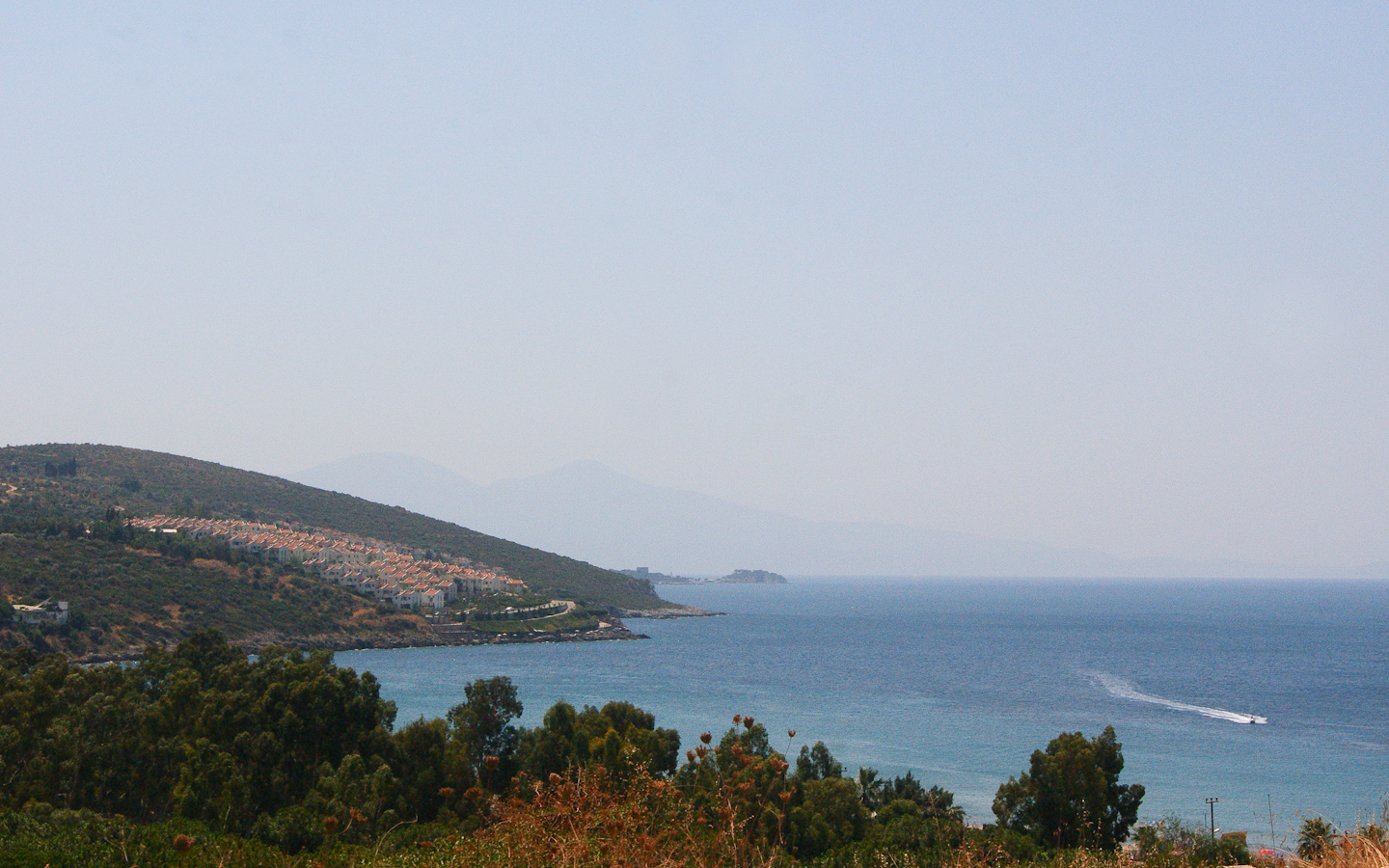 Bucht in Izmir, Türkei